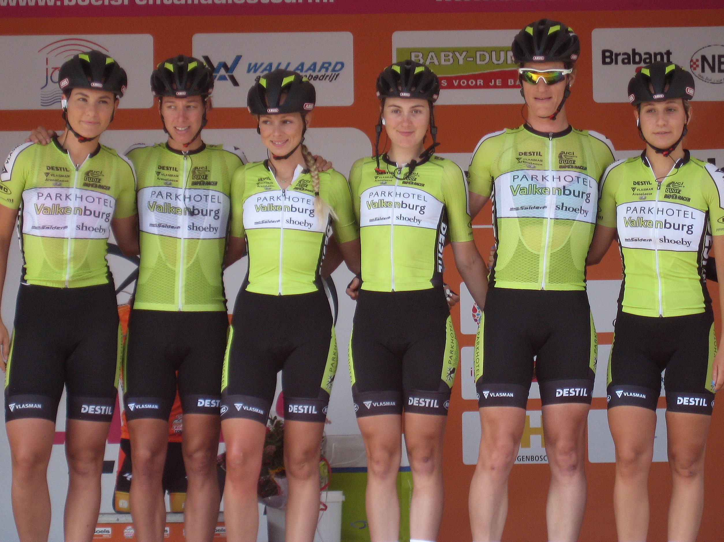 Team Parkhotel Valkenburg voor start 3e etappe Holland Ladies Tour 2016